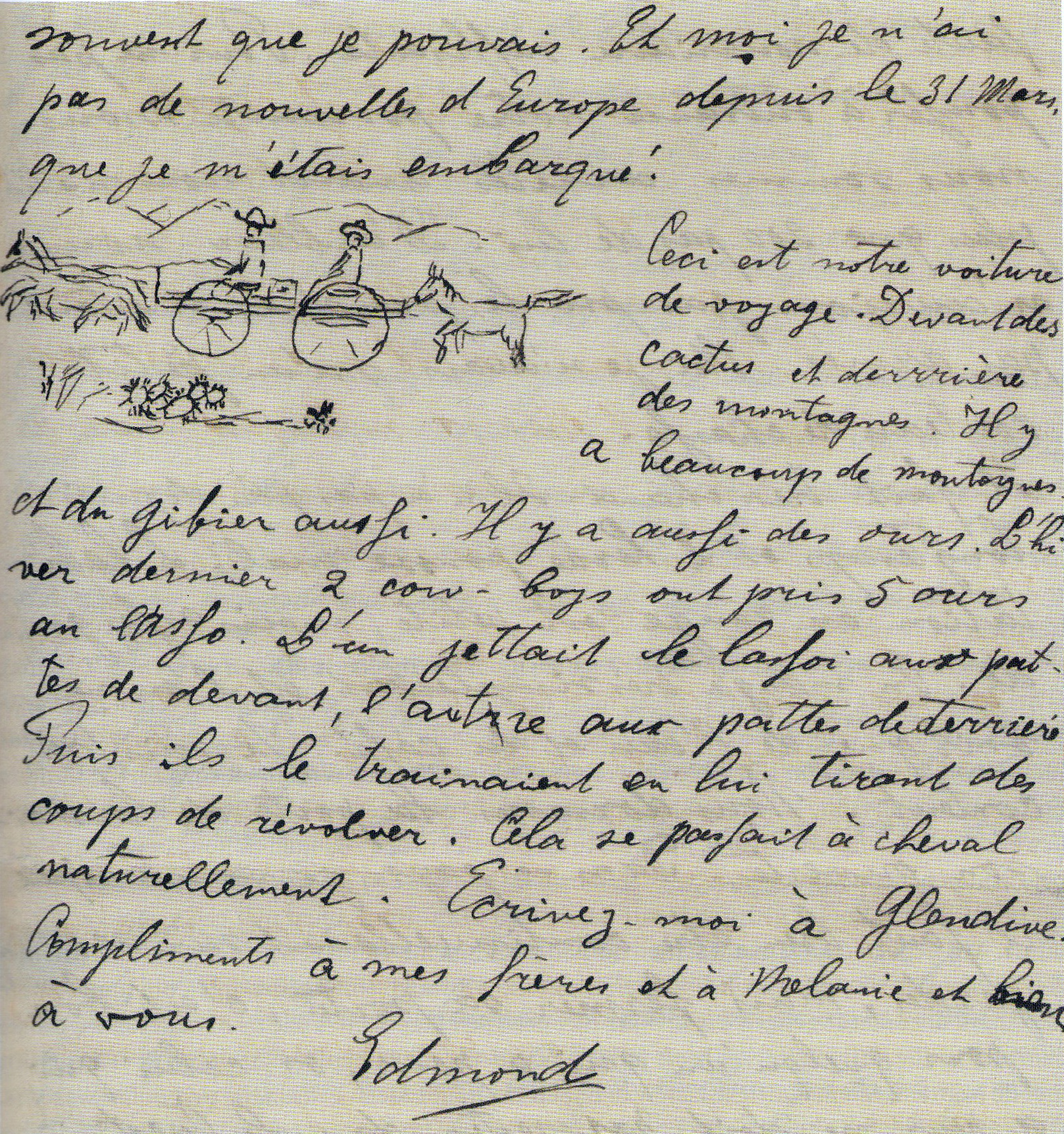 Detail van een brief geschreven door Edmond Regout tijdens zijn Amerika-reis in april 1895. Edmond was de tweede zoon van de Maastrichtse industrieel Gustave Regout en een kleinzoon van Petrus I Regout. Tussen 1895 en 1903 maakte hij drie reizen naar Amerika en Azië. Familiearchief Regout, RHCL Maastricht.